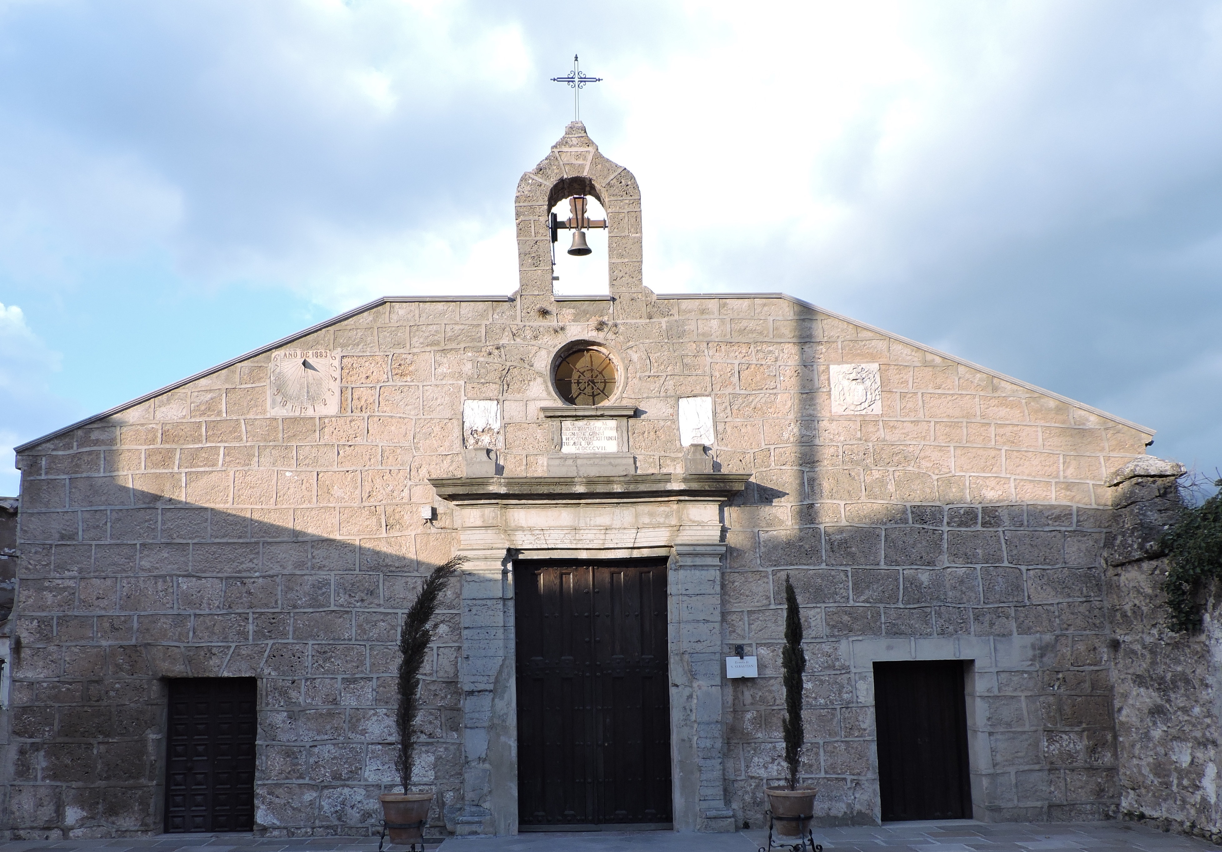 Portada principal de la Ermita de San Sebastián de Valdepeñas de Jaén.